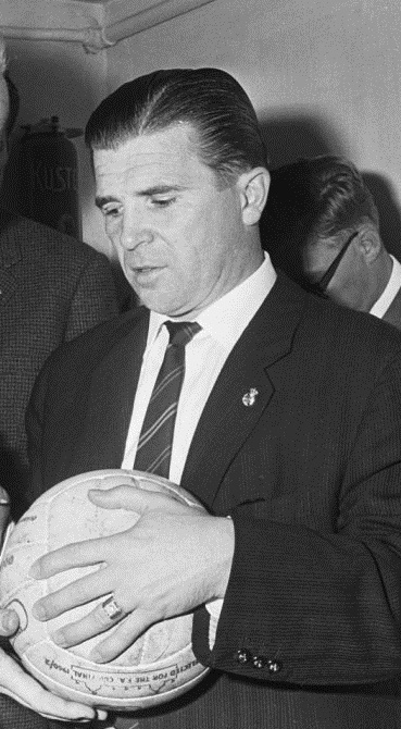 Real Madrid tegen Feyenoord 0-5, Kuiver met bal vraagt handtekening van Puskas (cropped).